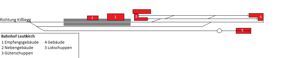 Gleisplan des Bahnhofes Leutkirch im Jahr 1872